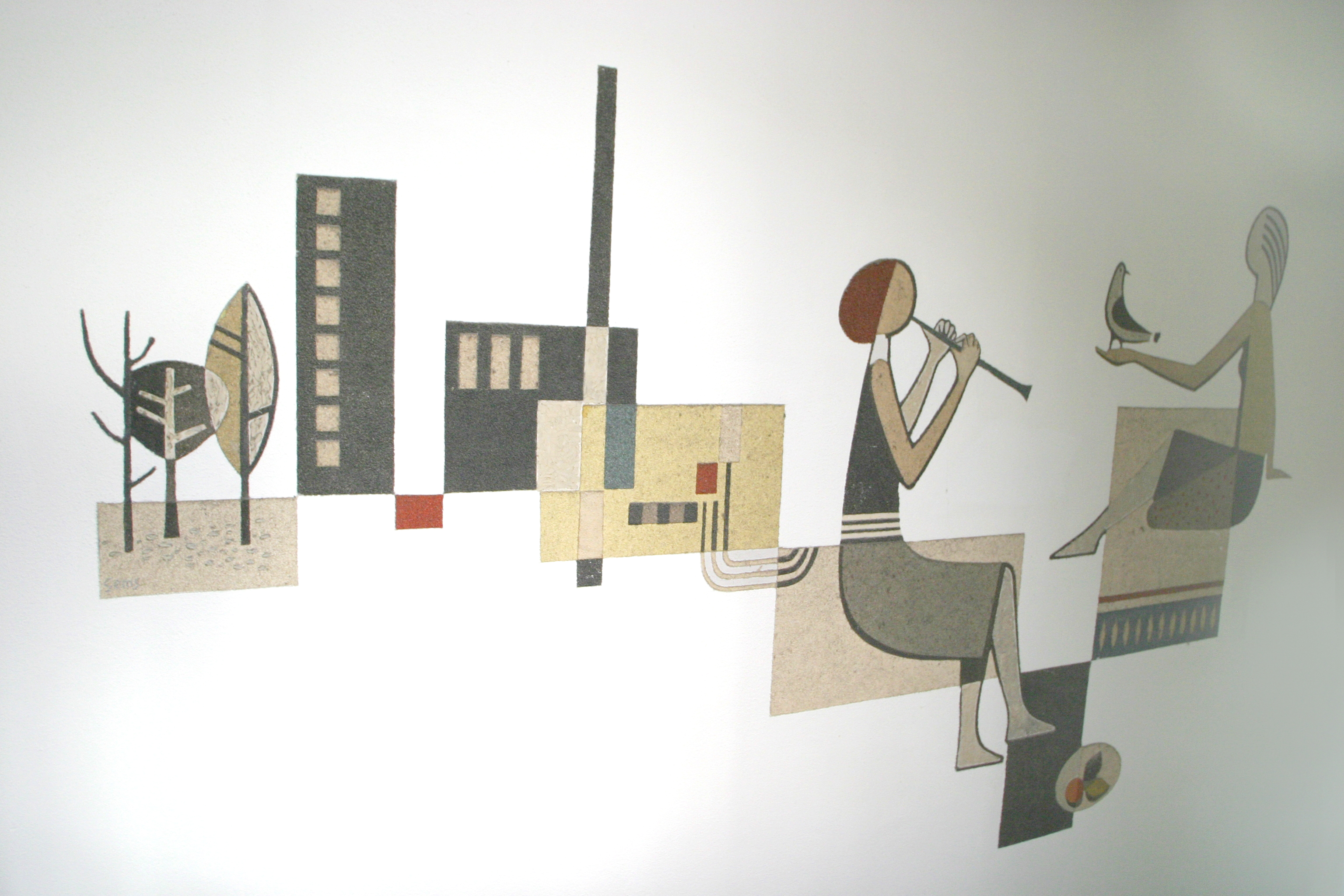 Die Kratzputzarbeit im östlichen Treppenaufgang des Seitengebäudes der Deutschen Rentenversicherung Rheinland-Pfalz in Speyer. Foto: Walter Hoinka